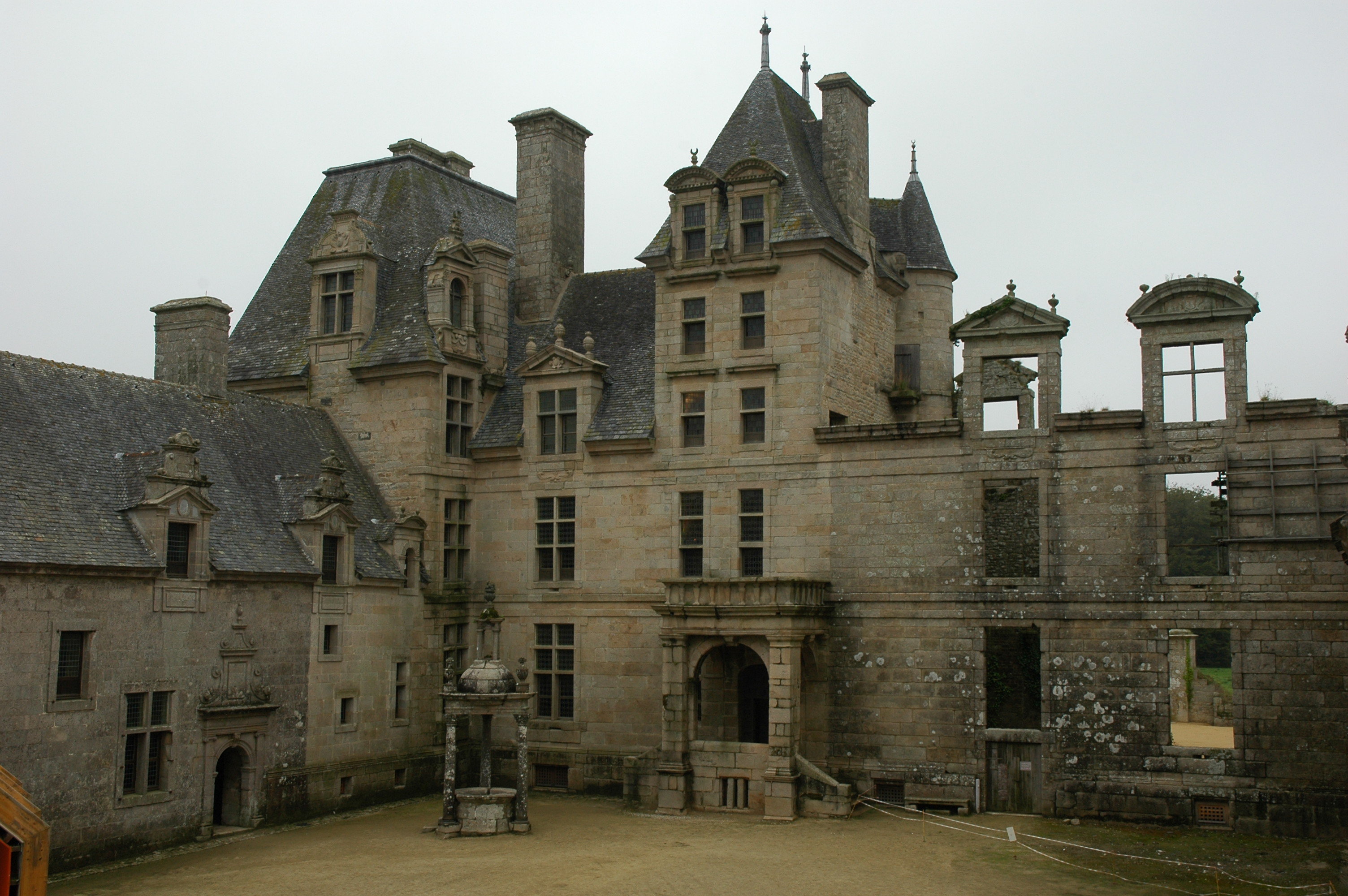 Château de Kerjean, Finistère, France